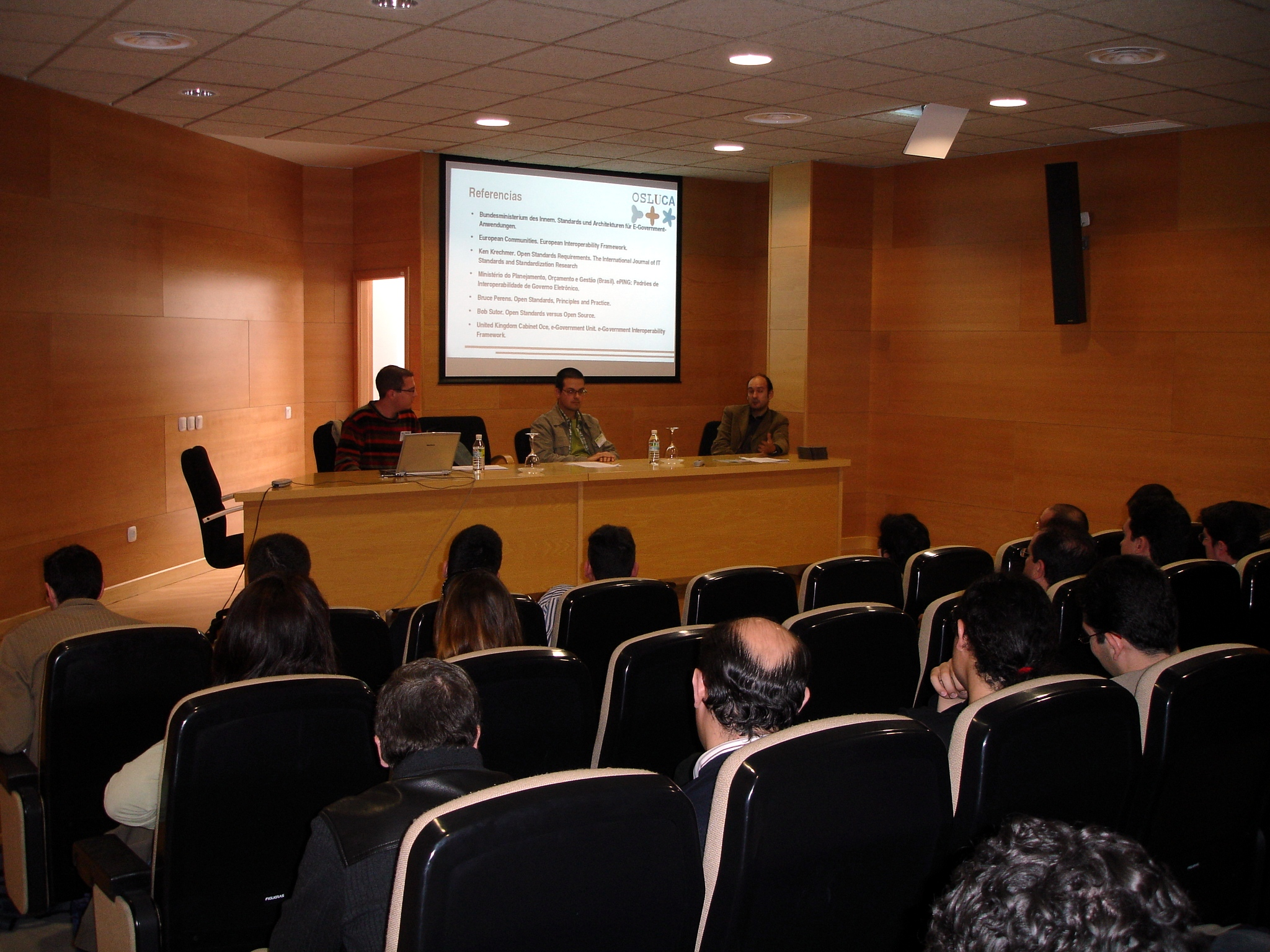 FLOSS International Conference